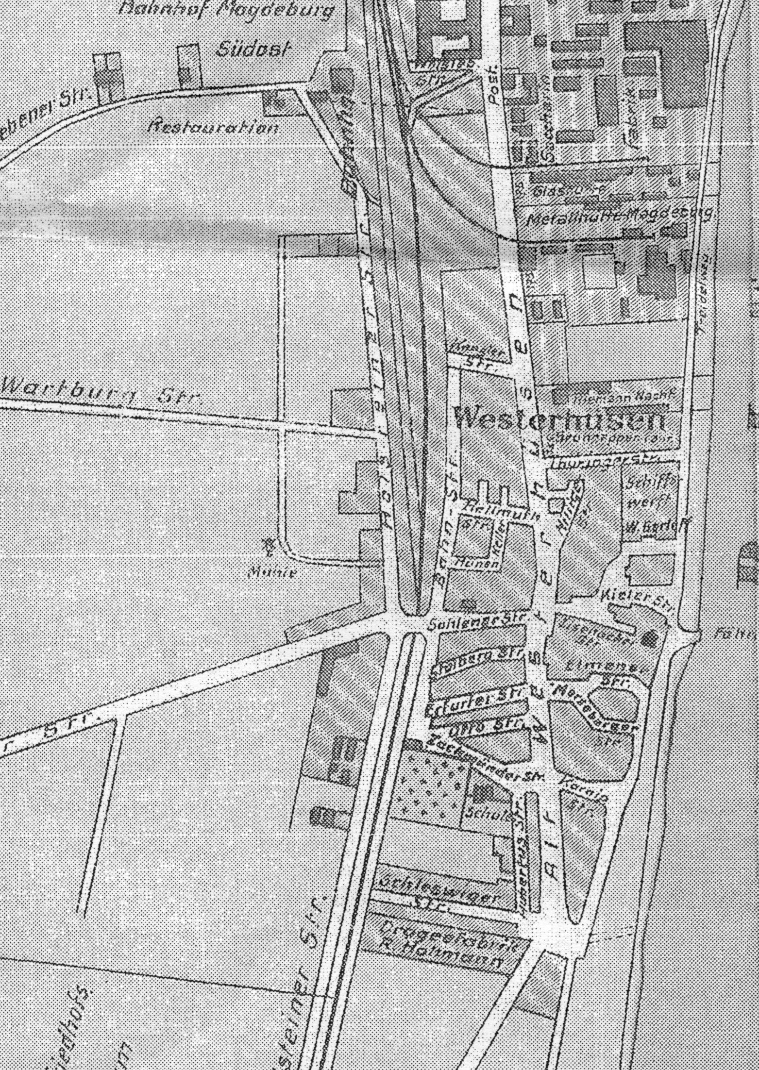 Ortsplan des Stadtteils Westerhüsen kurz nach der Eingemeindung 1910